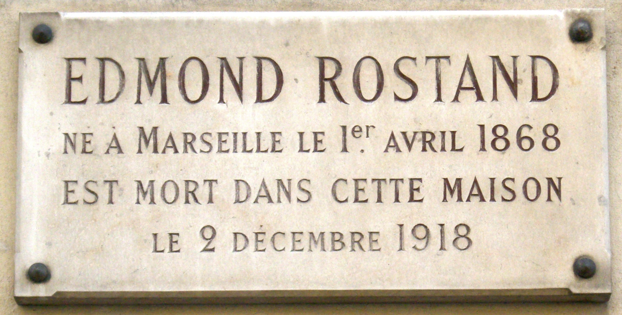 Plaque commémorative, 4 avenue de La Bourdonnais, Paris 7e. « Edmond Rostand, né à Marseille le 1er avril 1868, est mort dans cette maison le 2 décembre 1918. »